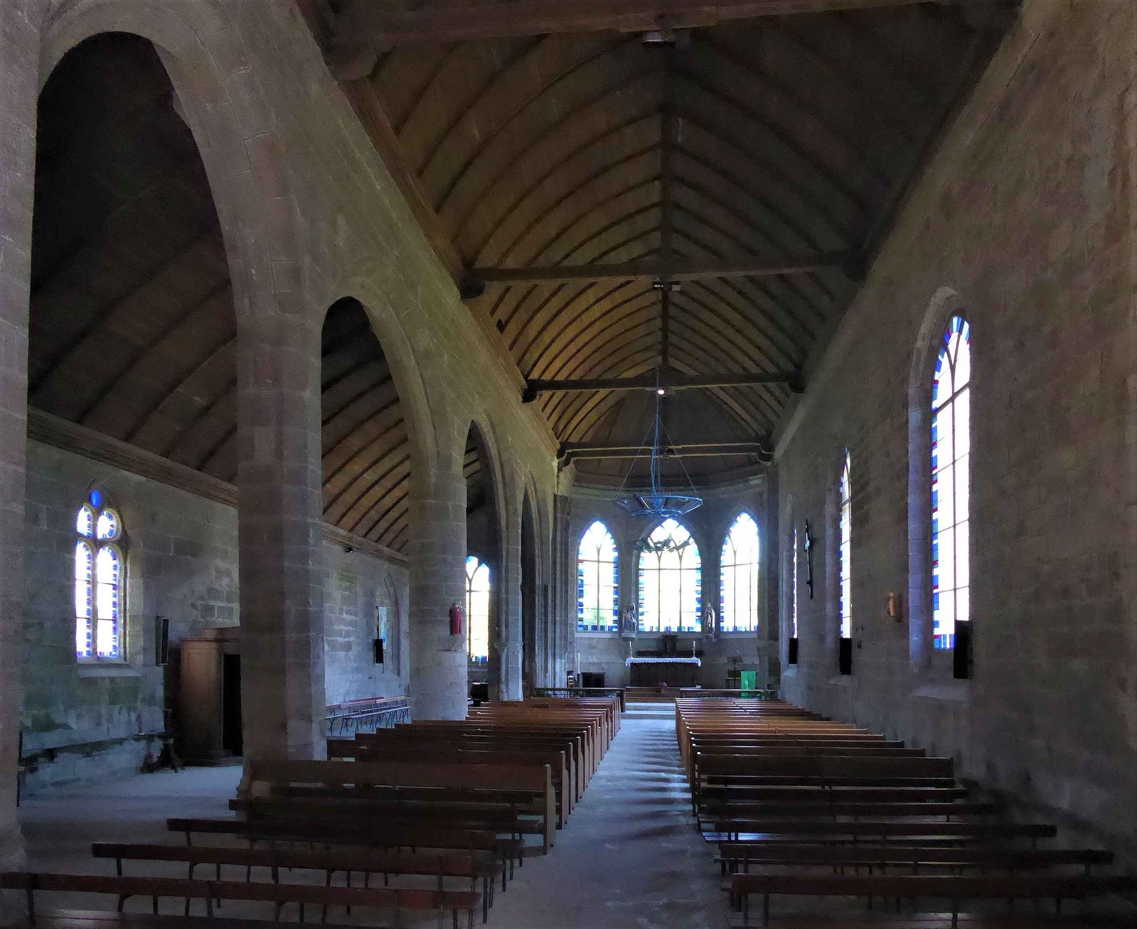 Église Sainte-Thumette de Kérity